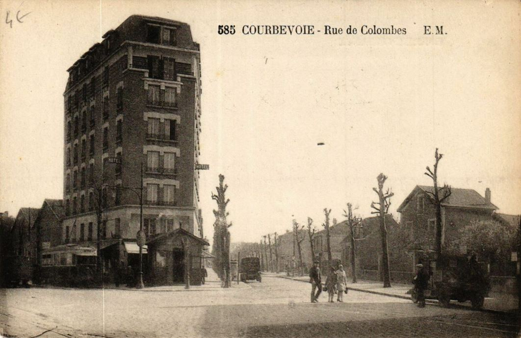 Courbevoie.Rue de Colombes